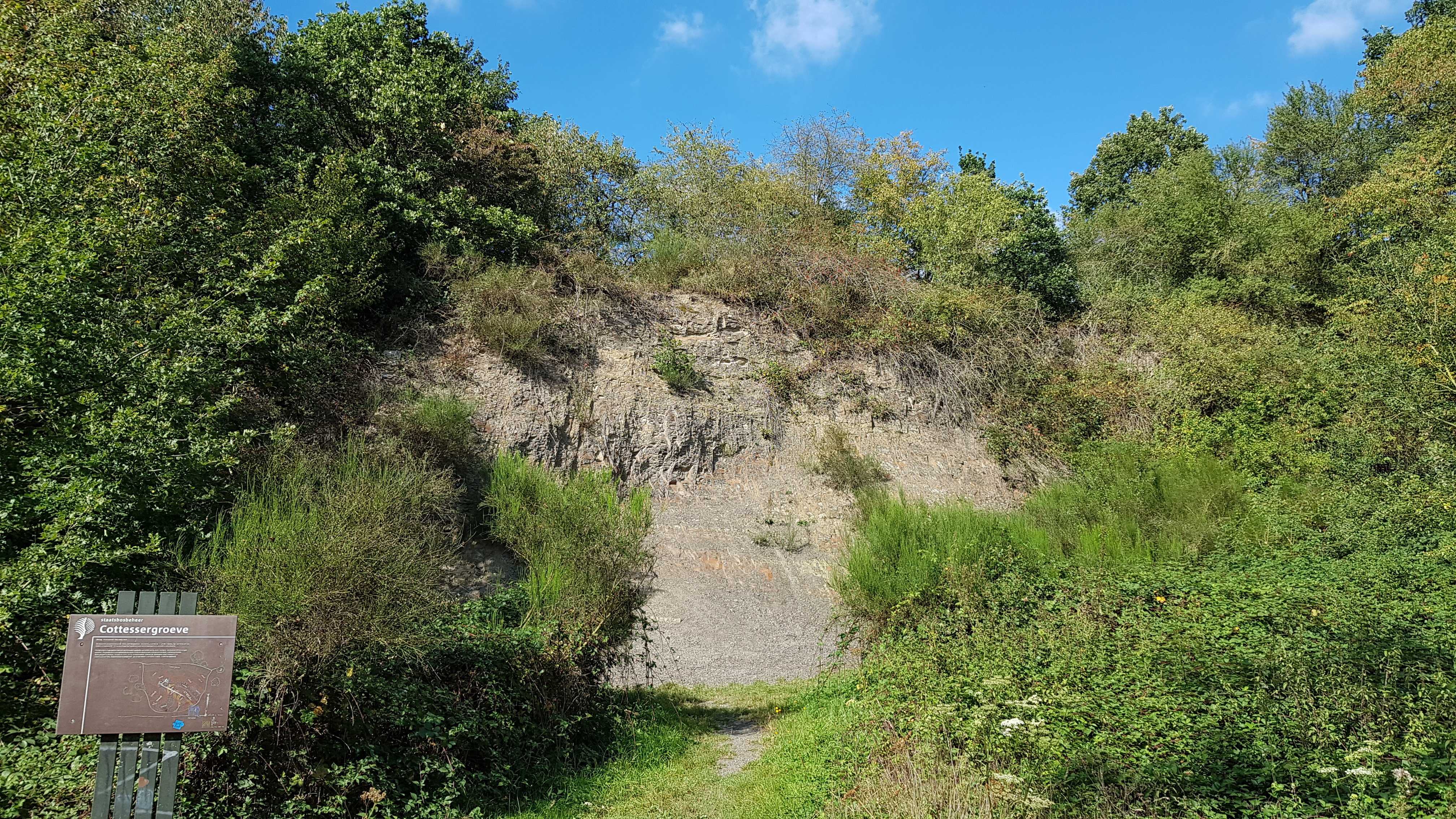 Cottessergroeve, Cottessen, Vaals, Nederland